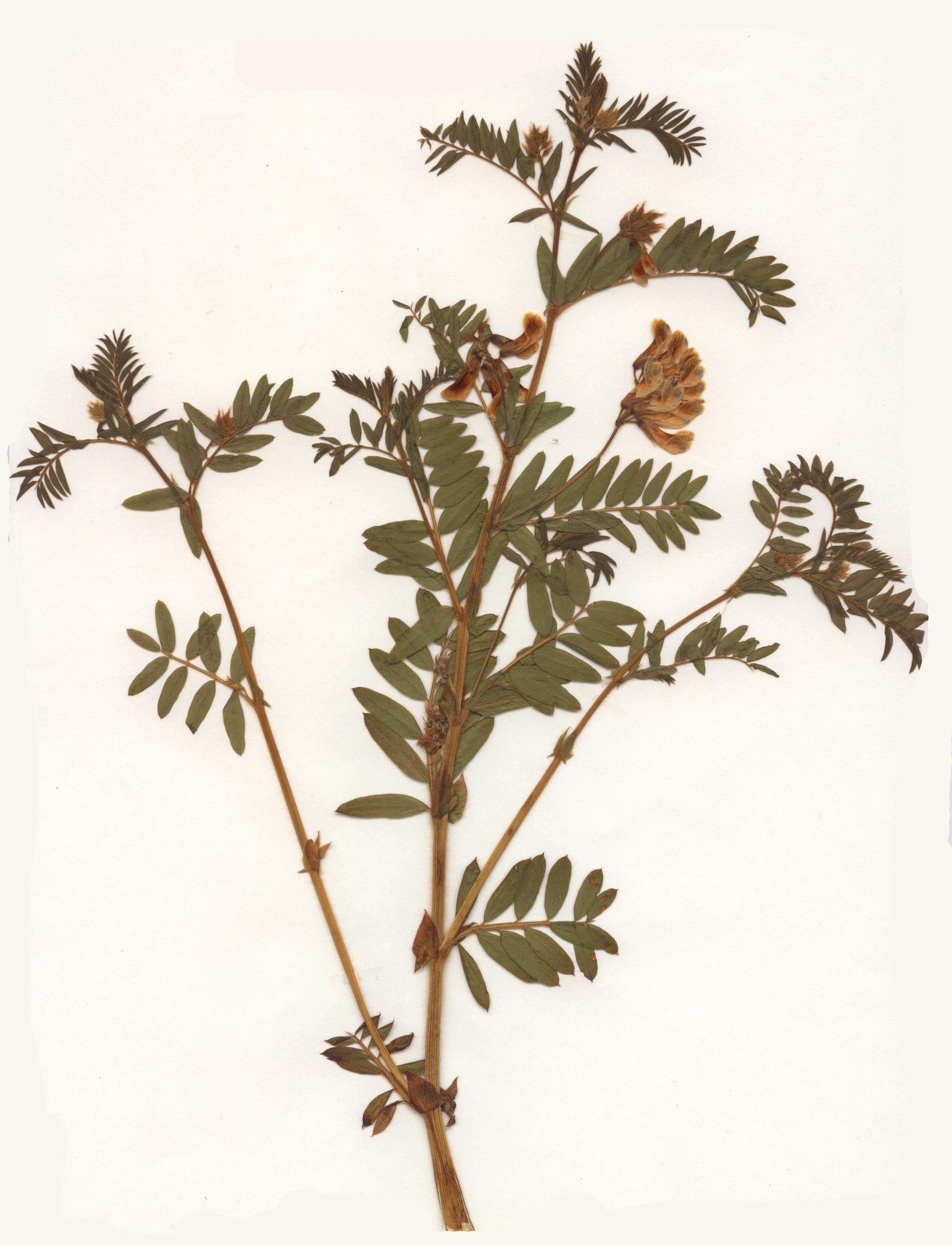 Vicia orobus Herbar Herbarbeleg v. 6. Juni 1979 Fundort: Spessart (exakter Fundort wurde retuschiert zum Schutz des Standorts)